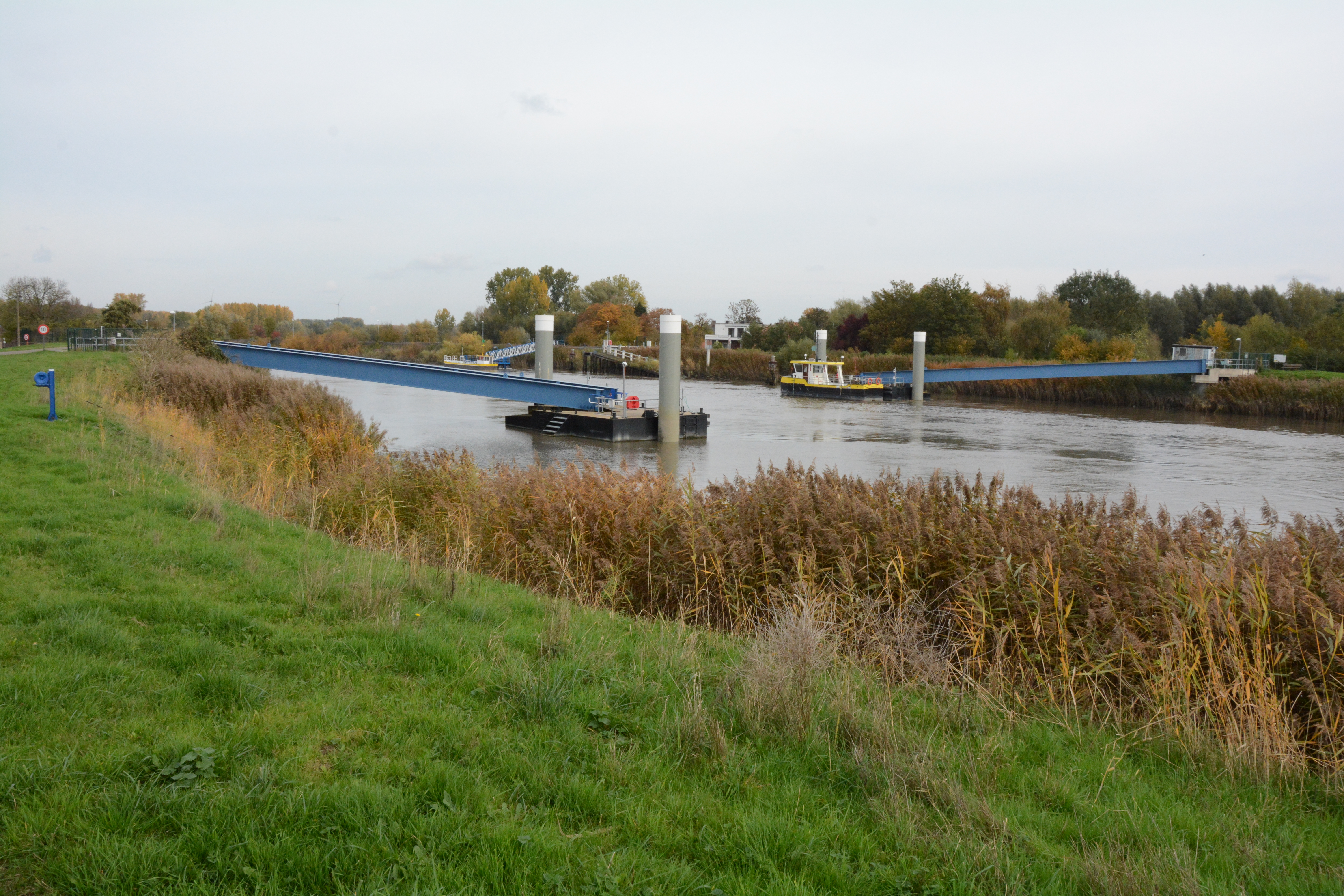 Appelsveer, nieuw